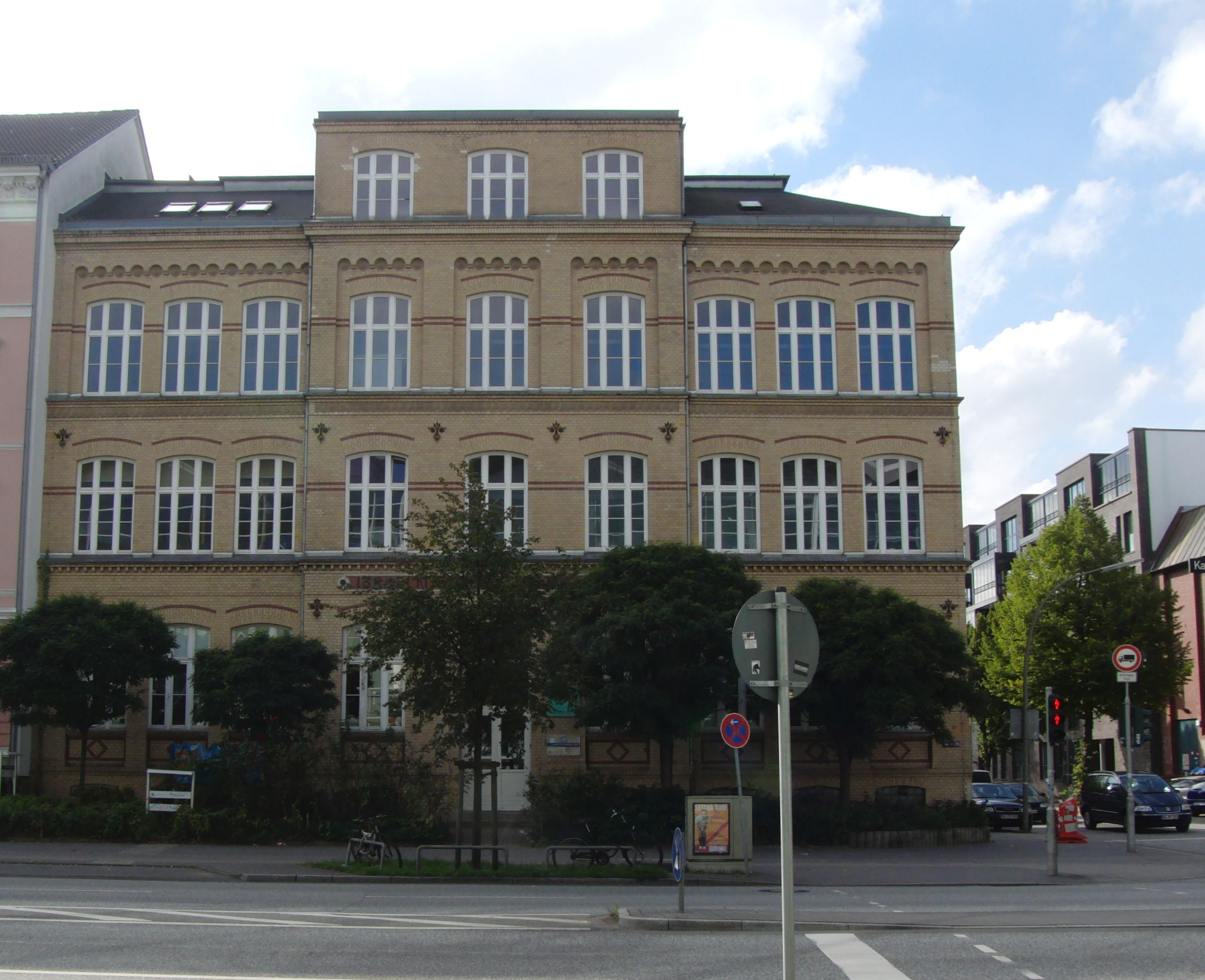 Israelitische Töchterschule, Karolinenstraße 35, Hamburg